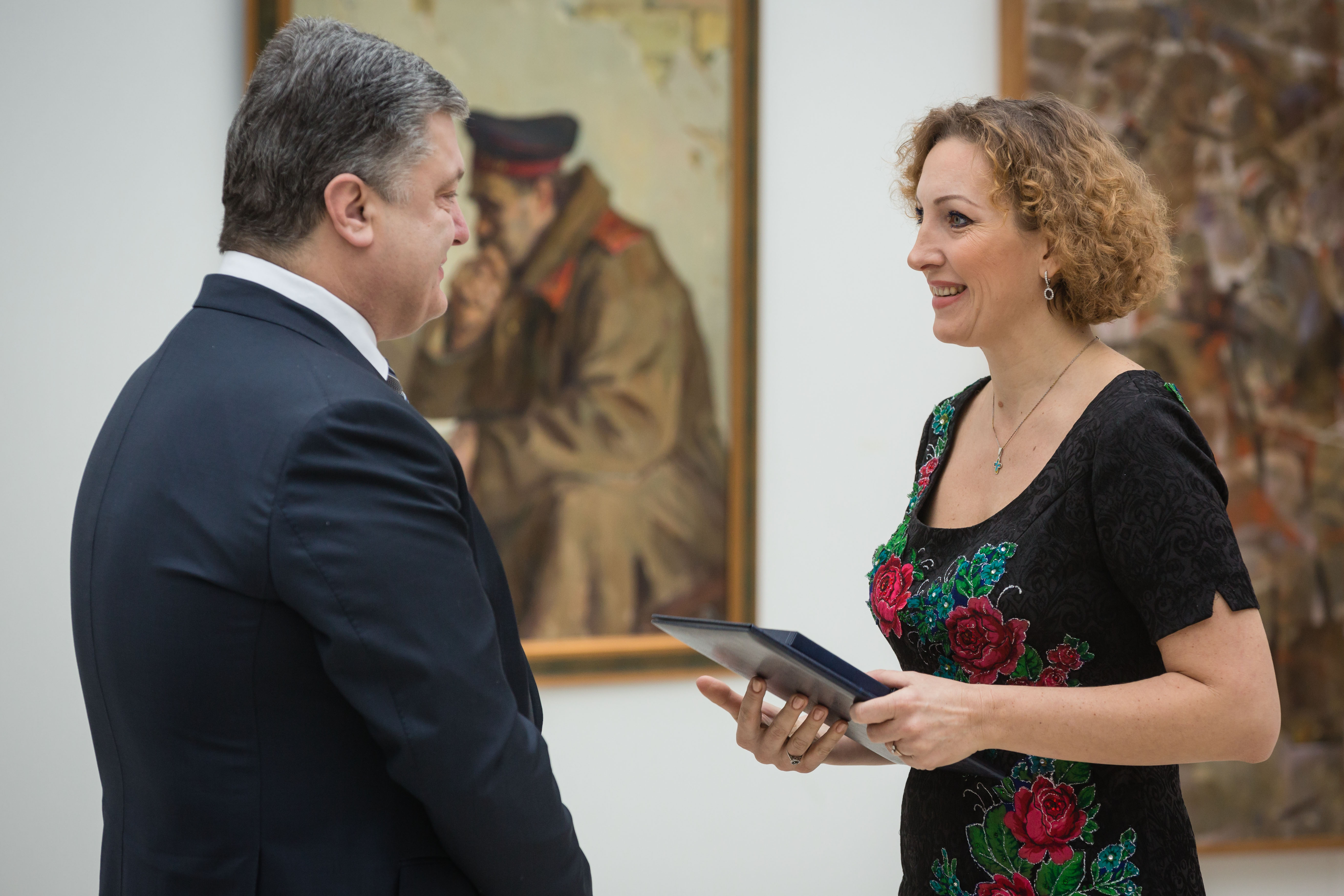 Анжеліна Швачка на церемонії вручення Національної премії України імені Тараса Шевченка 2016 року.